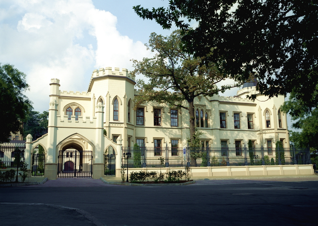 Шахский дворец, Одесса. После реконструкции